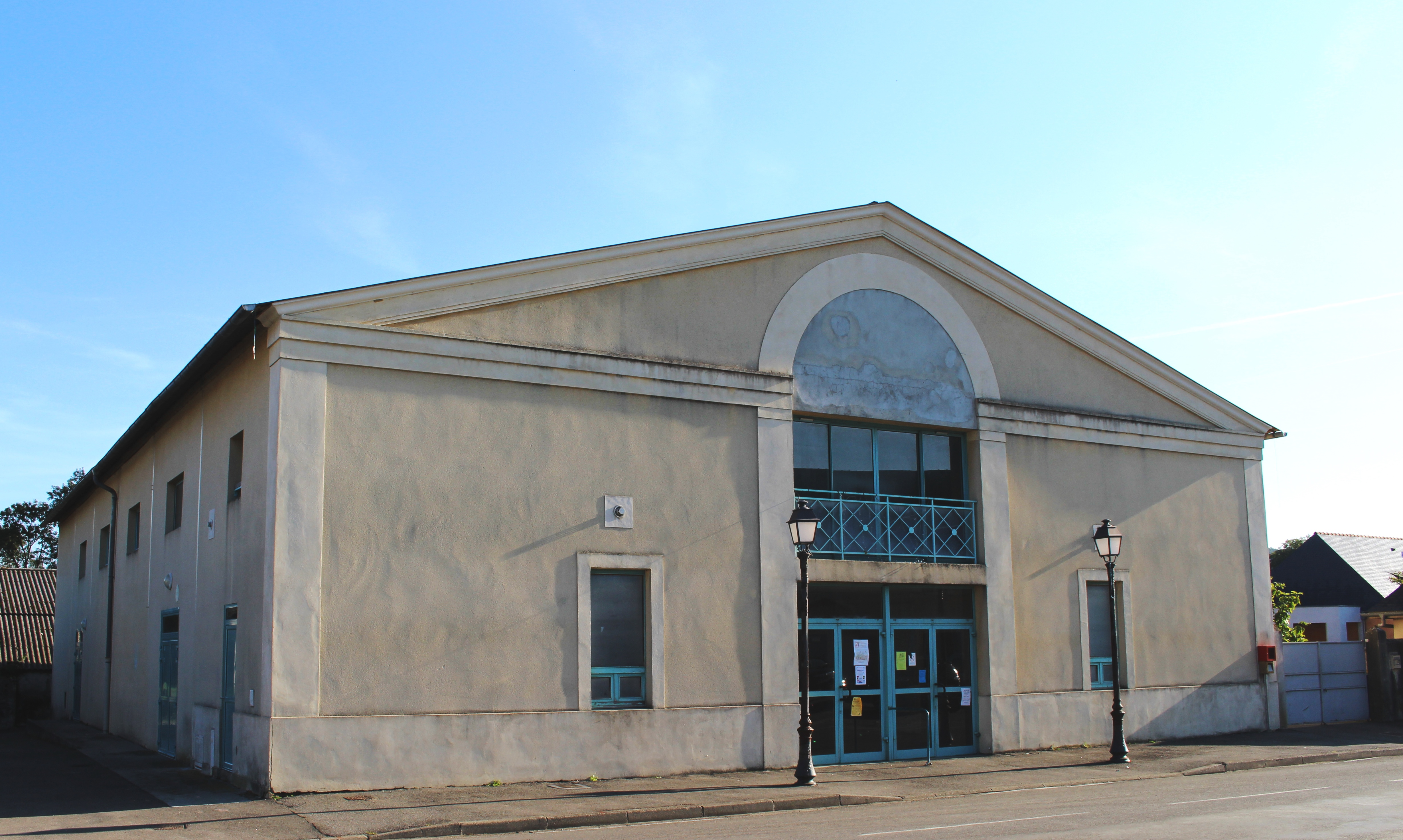 Salle des fêtes de Bénac (Hautes-Pyrénées)